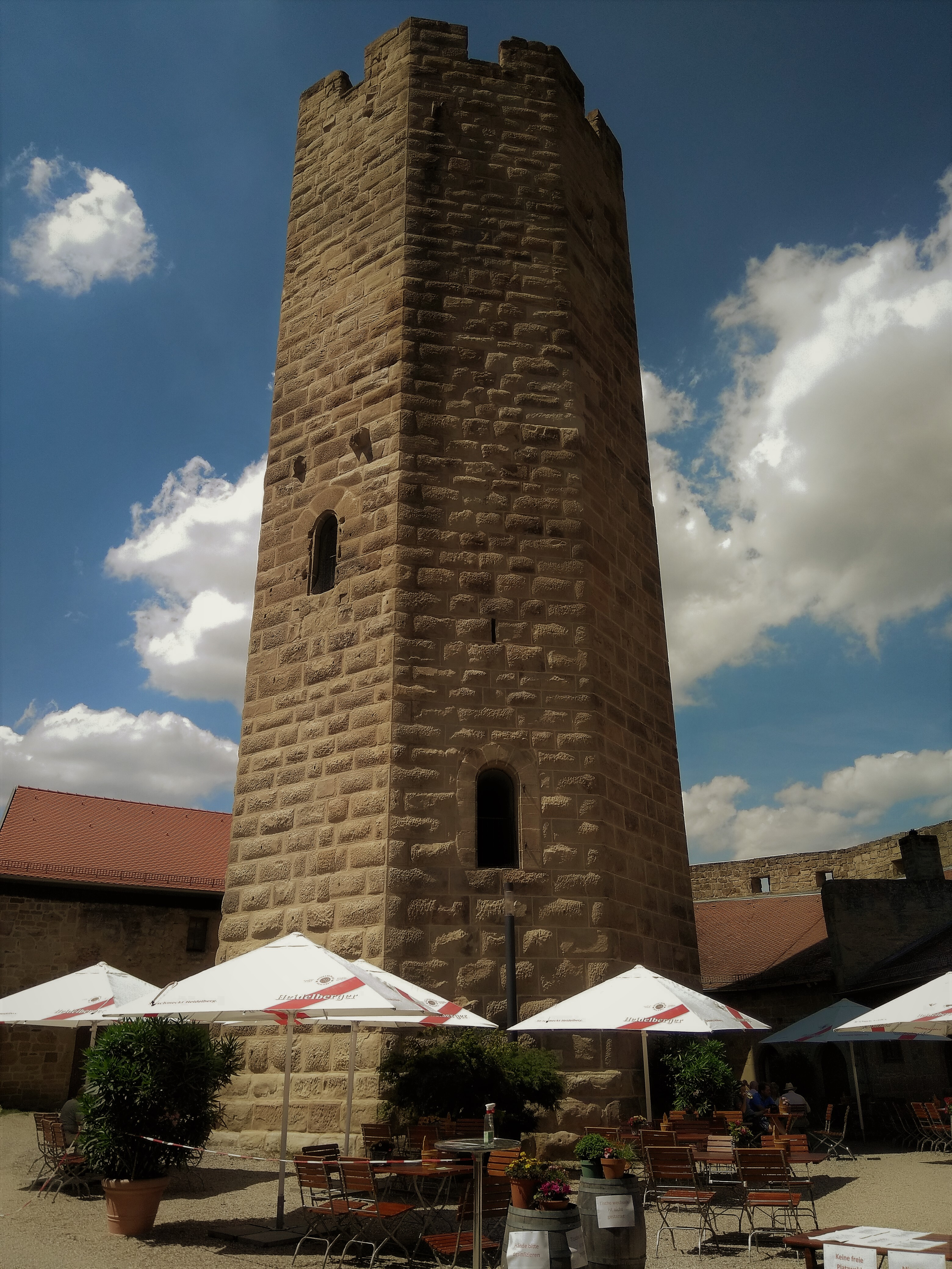 Vaade valdustornile ja linnuseõuele kirdest, peavärava juurest. Alumine aken-ukseava asetseb ruudukujulise šahtruumi ülaosas, keskel paiknev aken-ukseava ümmarguse ruumi I korrusel. Ukseavade ümber võisid varem olla puidust rõdud.